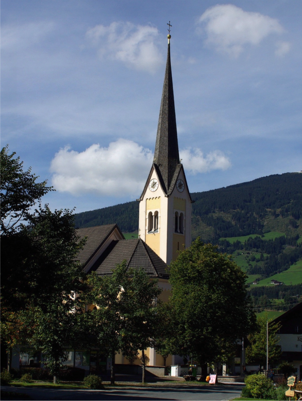 Kath. Pfarrkirche hl. Vitus und Friedhof